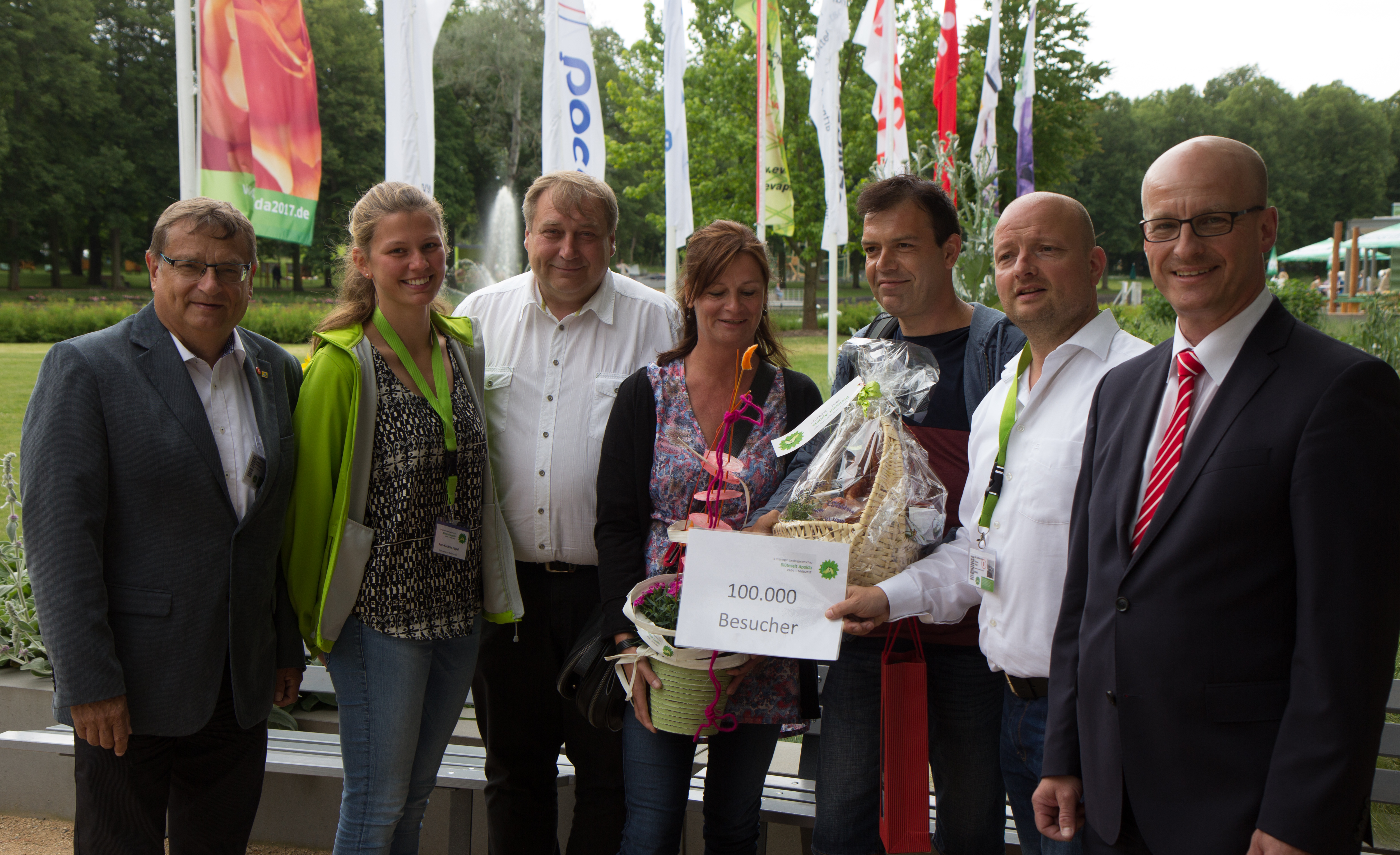 4. Thüringer Landesgartenschau 2017 in Apolda